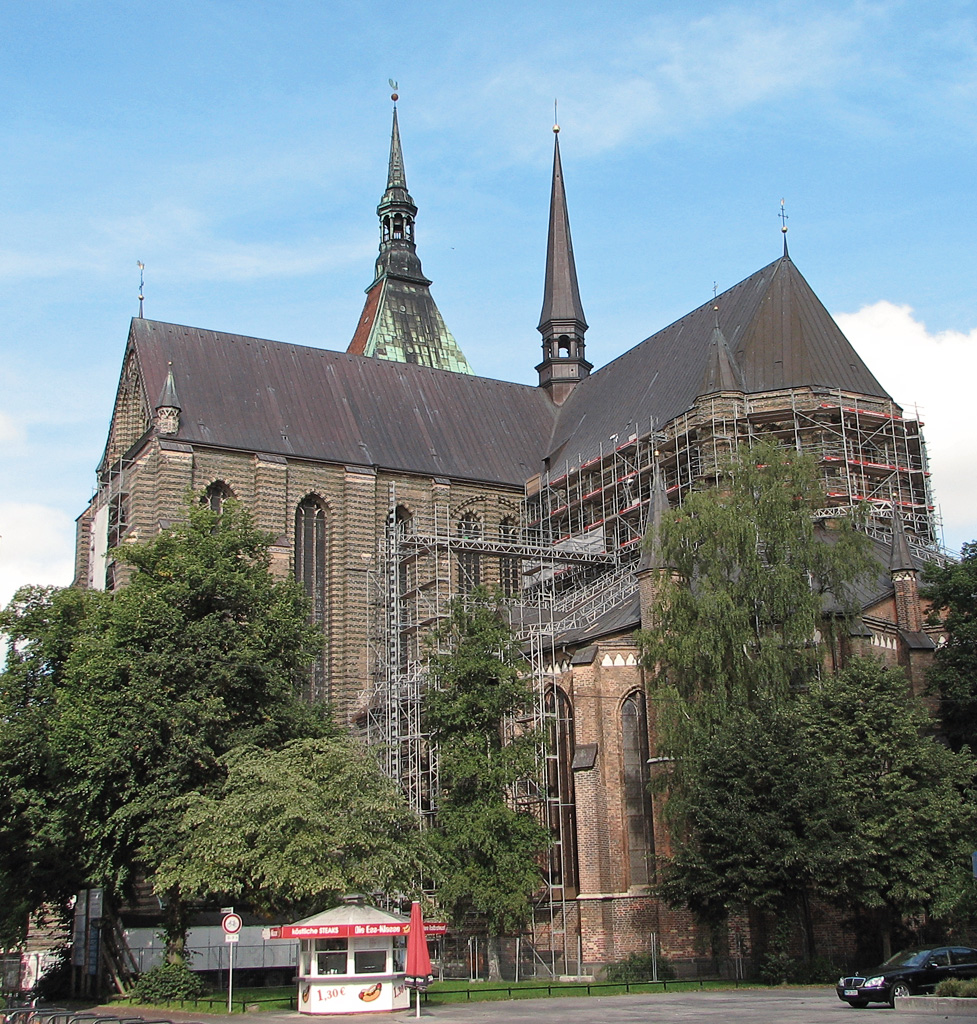 Beschreibung: St. Marien Kirche in Rostock, Germany Fotograf: Darkone, 17. August 2005